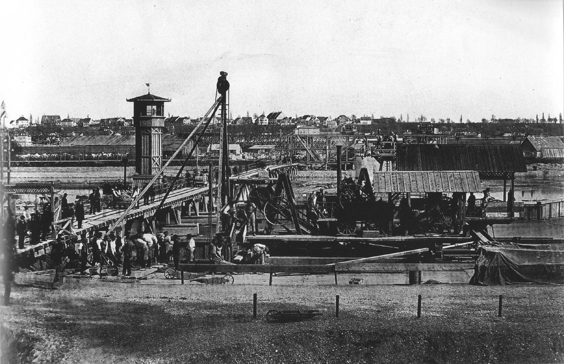 Bau der Braunauer Eisenbahnbrücke in München